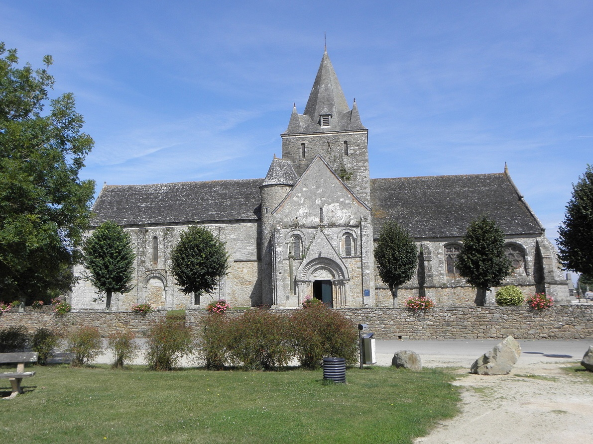 Flanc méridional de la chapelle ND de Kernitron en Lanmeur (29).